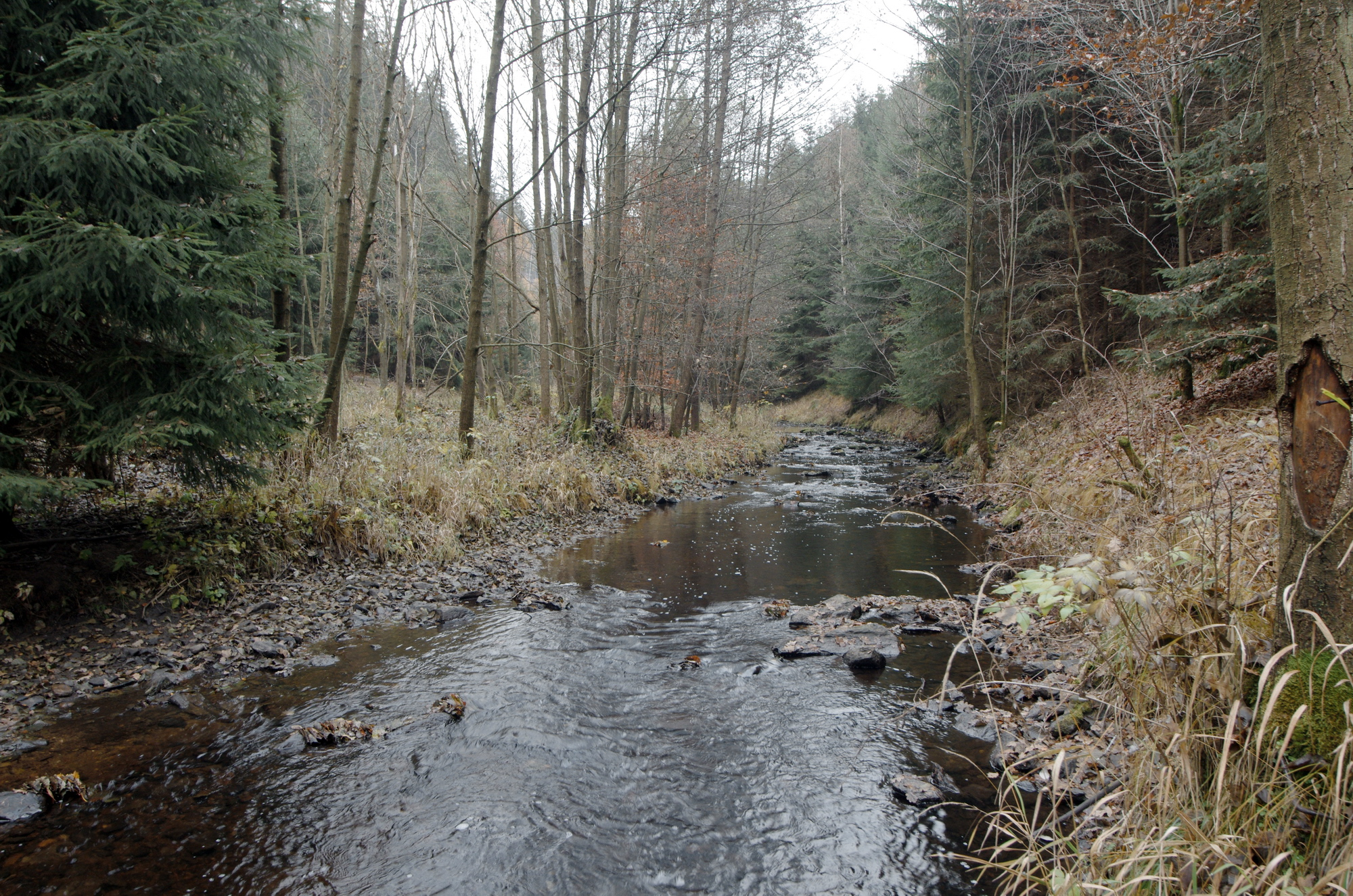 Potok Malá Libava pohled na potok od soutoku s Velkou Libavou, v místě nad obcí Libavské Údolí, okres Sokolov